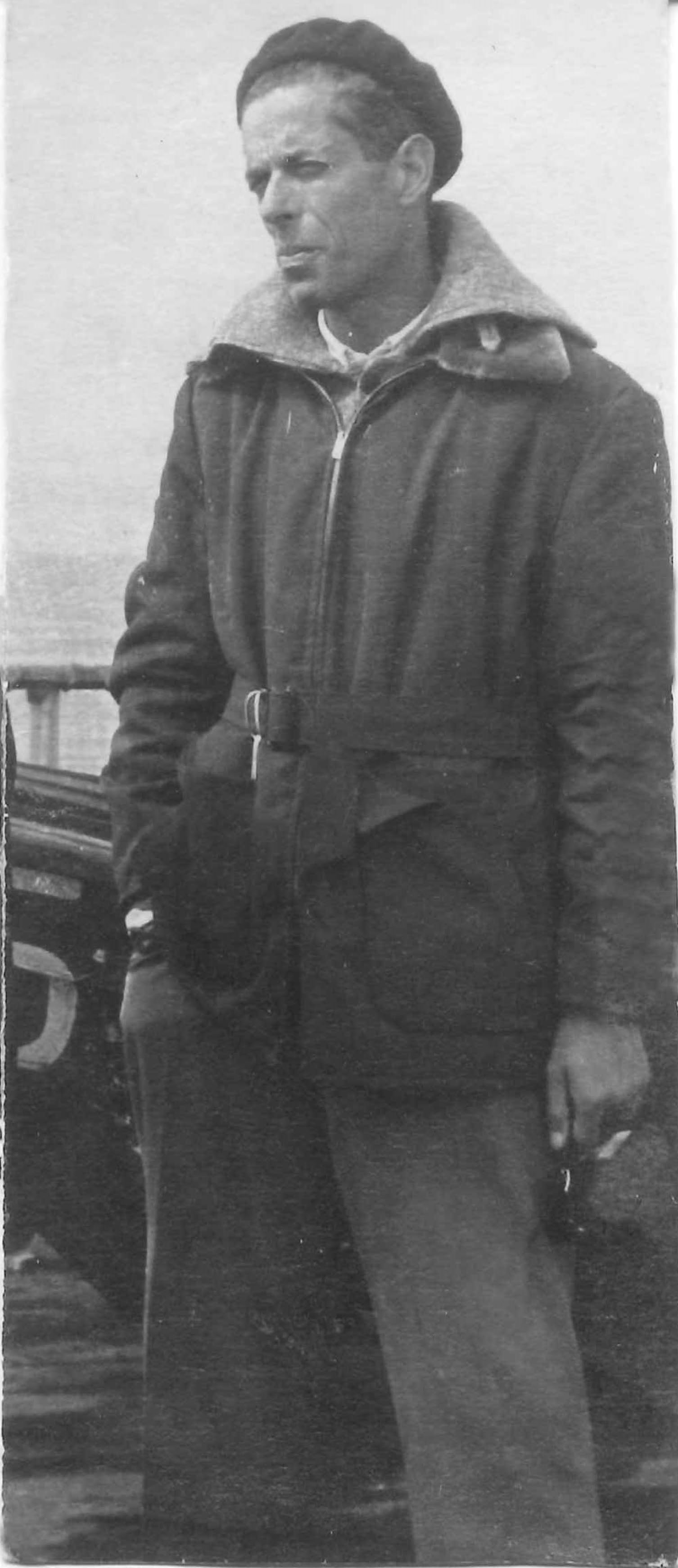 Estudando os otólitos do bacalhau em navio bacalhoeiro português no mar da Gronelandia.